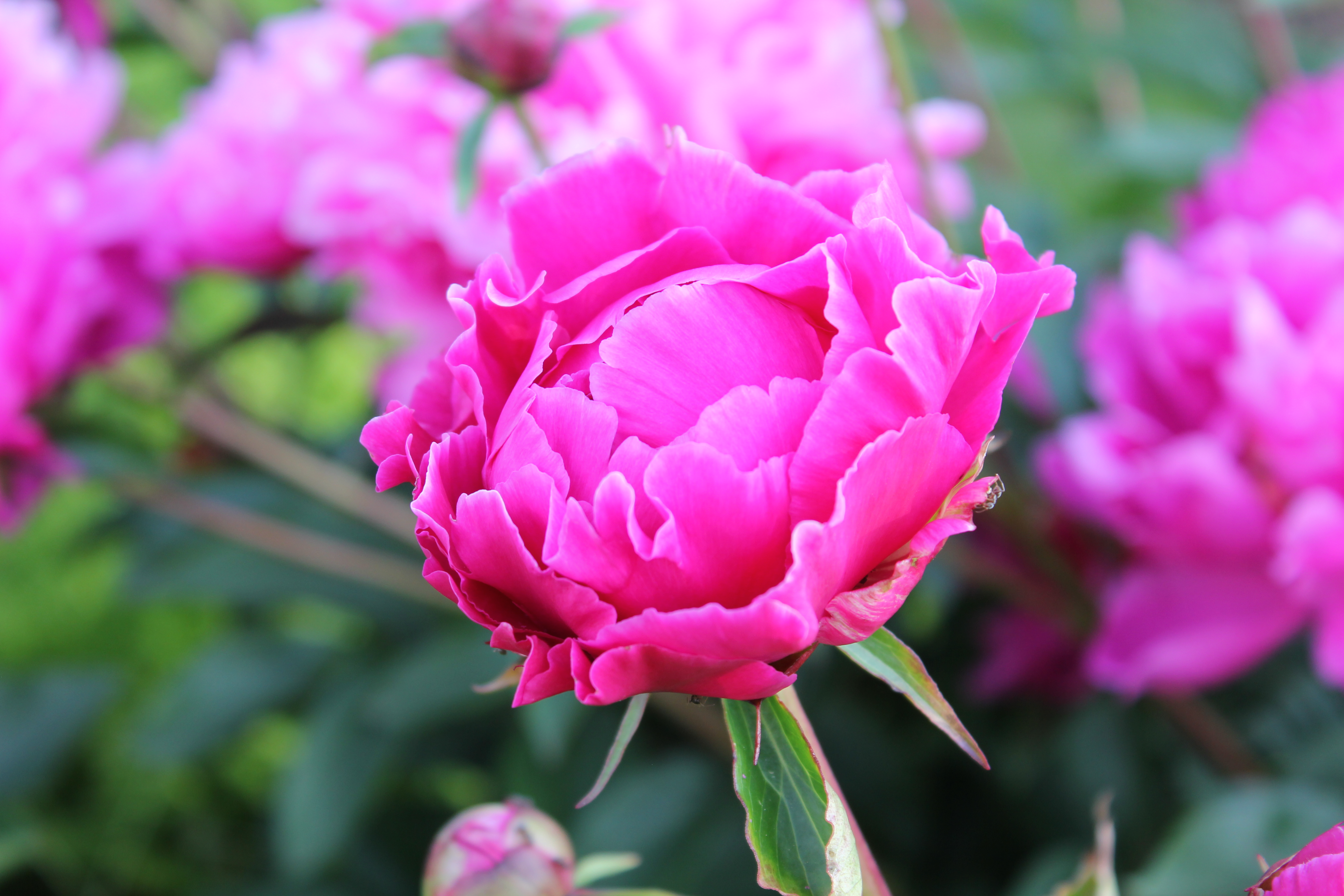 Fiore di peonia in piena fioritura